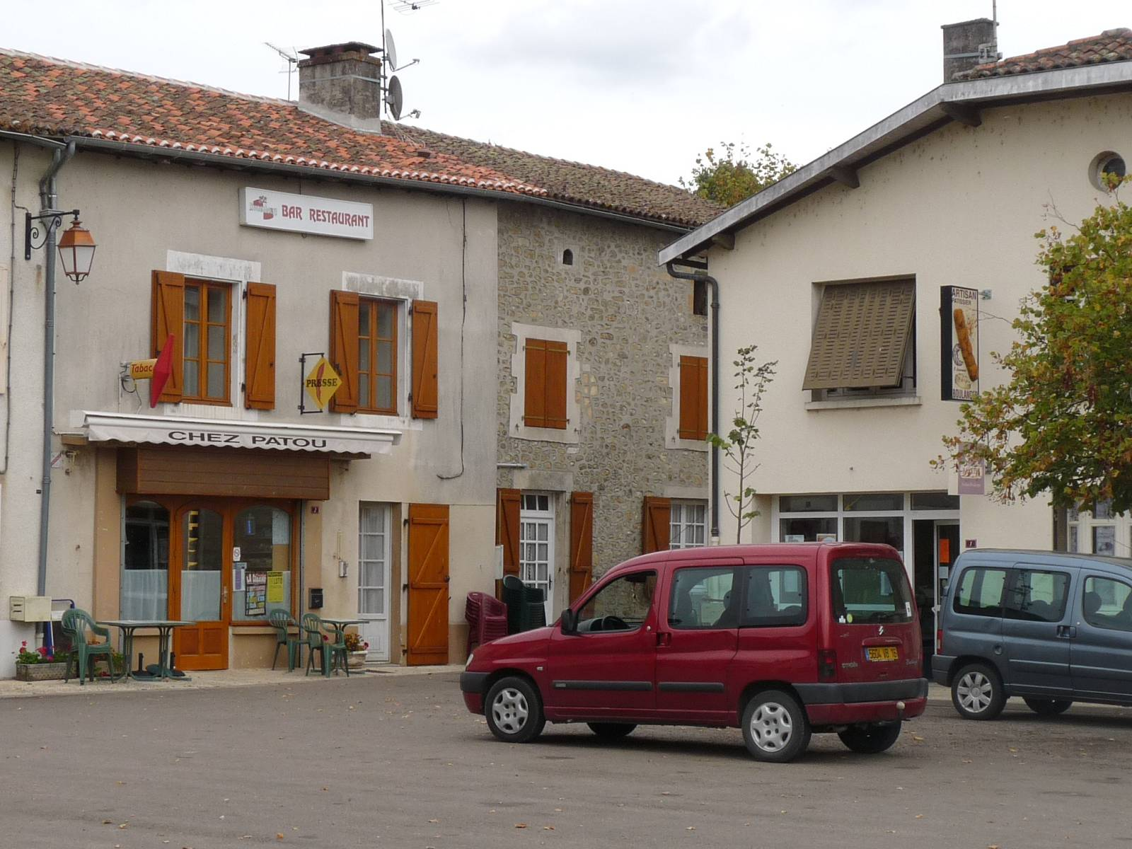 place du village d'Alloue, Charente, France